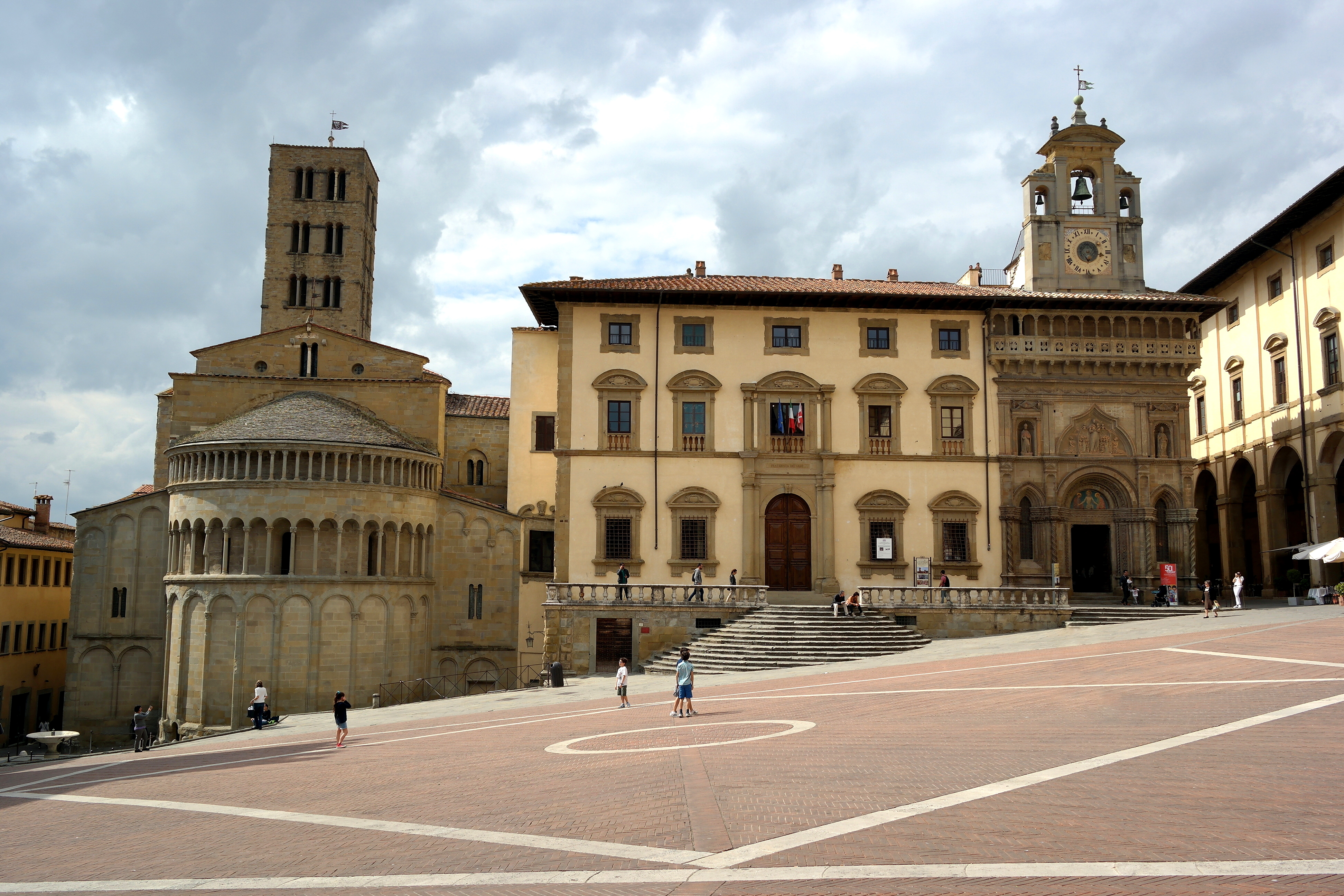 Piazza Grande ad Arezzo